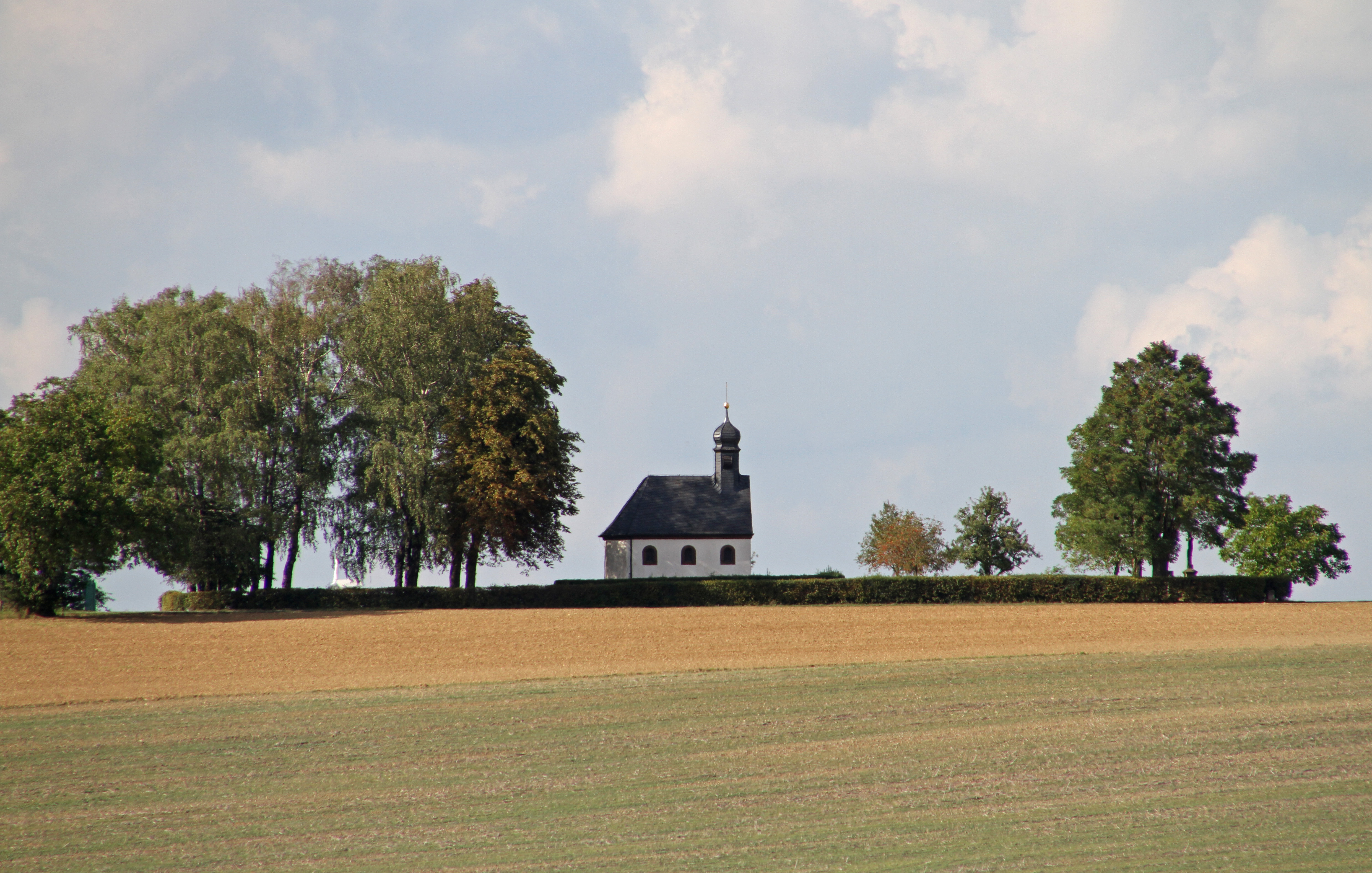 Reifenberg, Kriegergedächtniskapelle; östlich der Ortslage auf dem Häselberg; kleiner Putzbau, 1925.